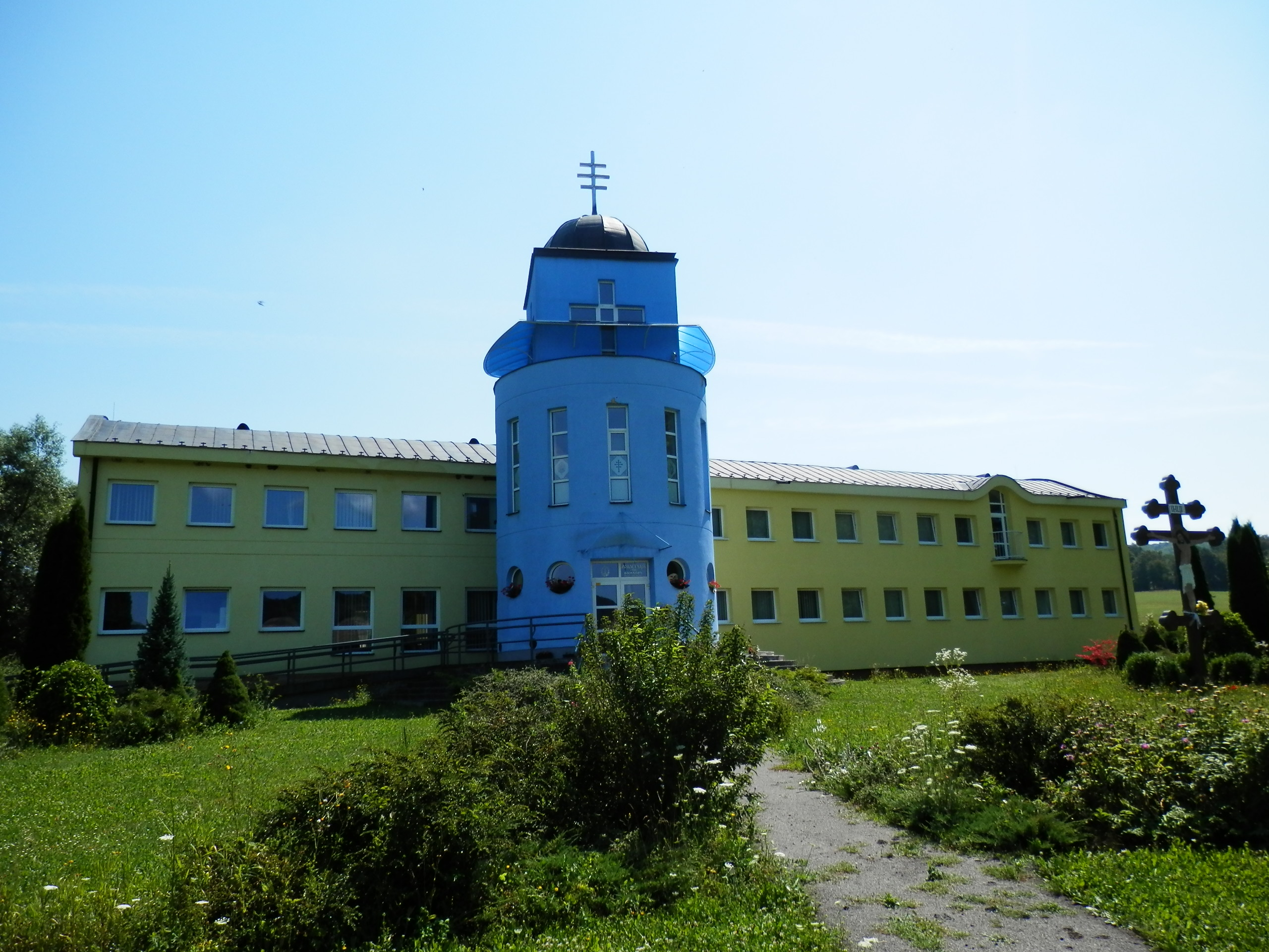 Obec Krásny Brod v okrese Medzilaborce sa prvýkrát písomne uvádza už v roku 1557. Historicky patrí do regiónu Zemplín, územno-správne do Prešovského kraja. Od roku 1892 sa v obci spracovávala ropa. V katastri obce sa nachádza národná kultúrna pamiatka - zrúcanina chrámu Zostúpenia Svätého Ducha zo 14.storočia